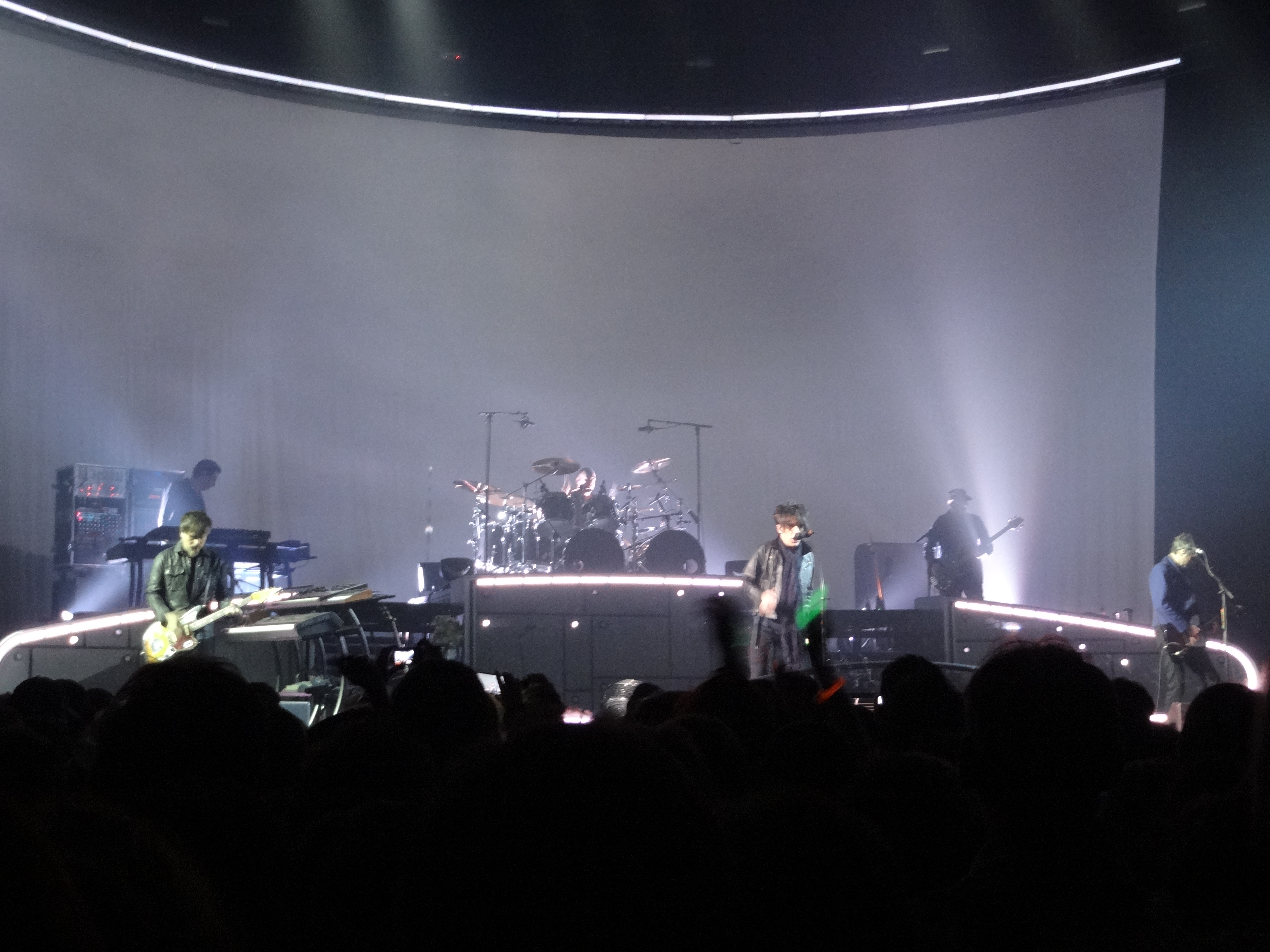 Concert d'Indochine à Brest le 23 mars 2013